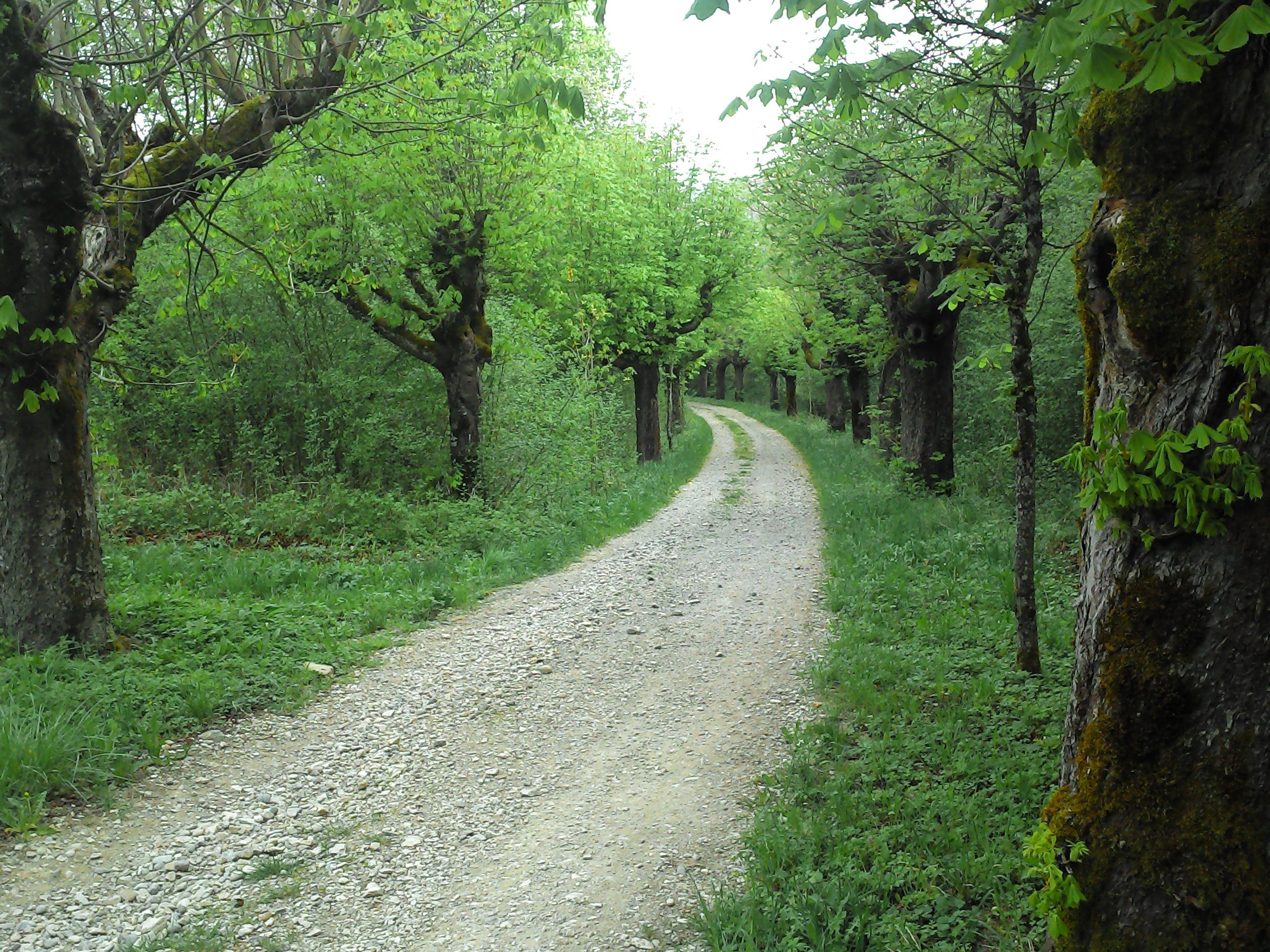 Küssaberg, Gemeinde im Landkreis Waldshut in Baden-Württemberg: Die Römerstraße Tenedo—Iuliomagus, abgehend vom Pass bei Bechtersbohl.